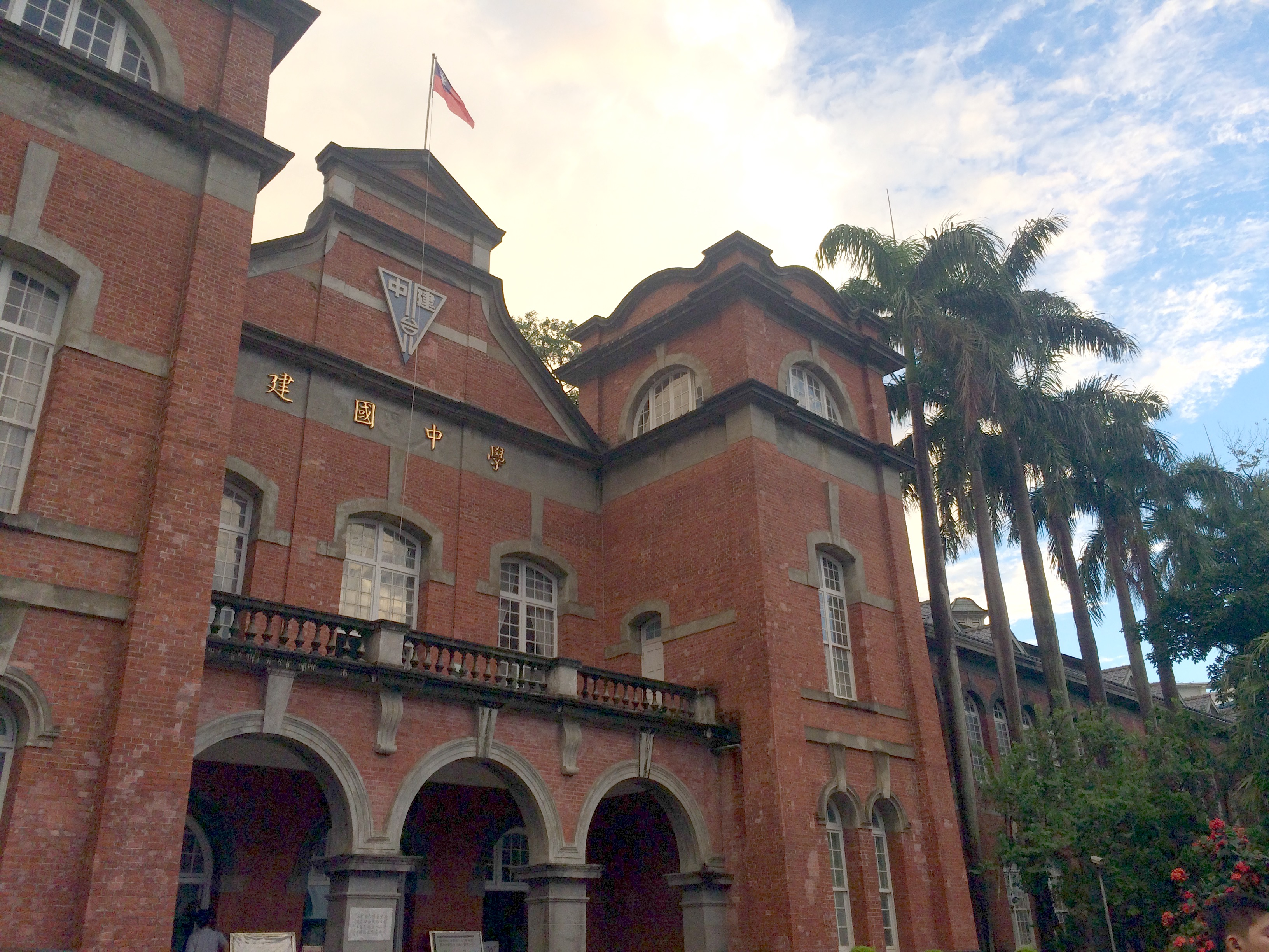 A shot of the Red House, along with other nearby stuff. Captured by an iPhone 5.